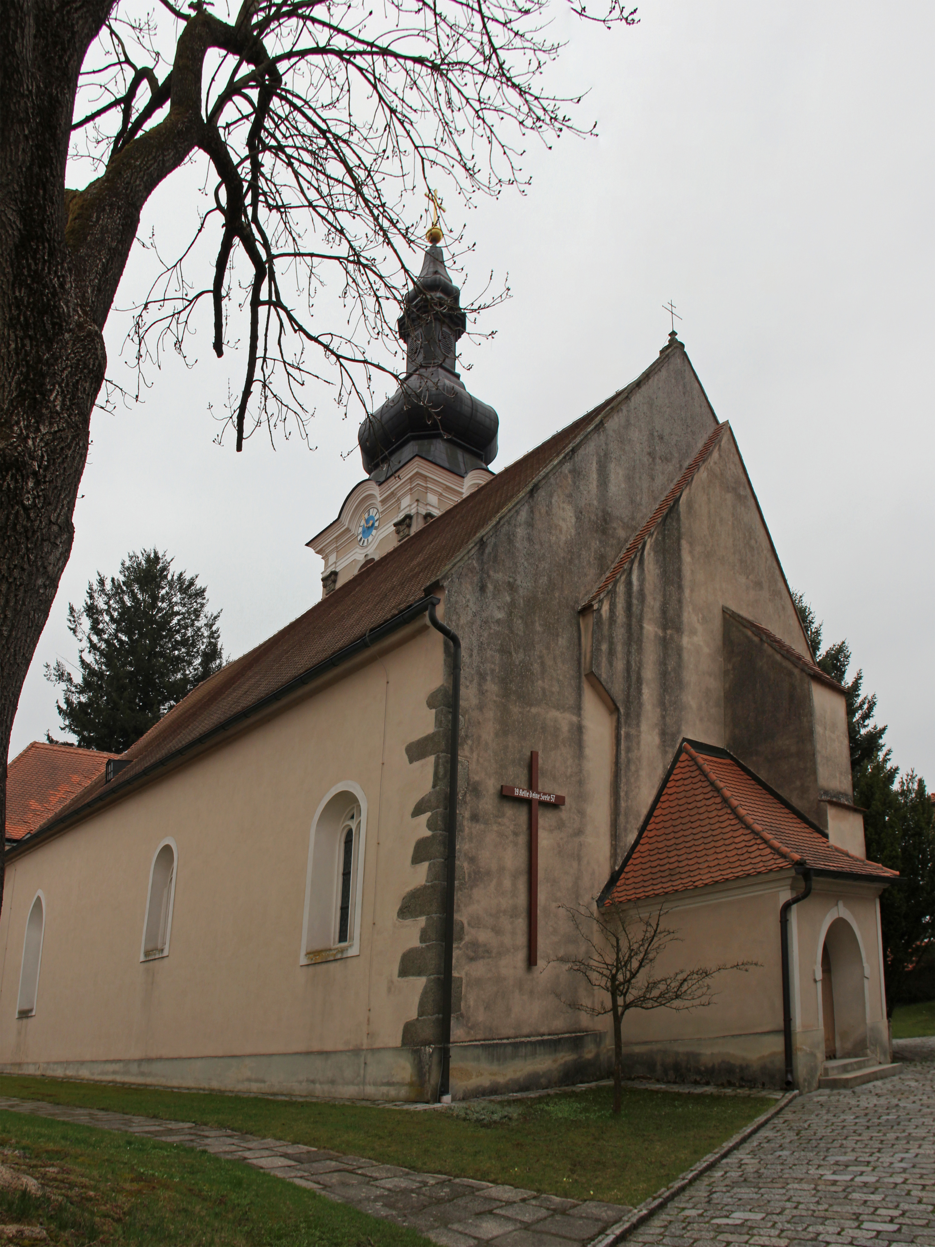 Ursprünglich einschiffige, romanische Kirche aus dem 13. Jahrhundert, mit Rechteckchor. Mitte des 14. Jahrhunderts um zwei Kapellen und das nördliche Seitenschiff erweitert. 1741 barockisiert. Zweigeschoßige Sakristei an der Nordseite von 1880.